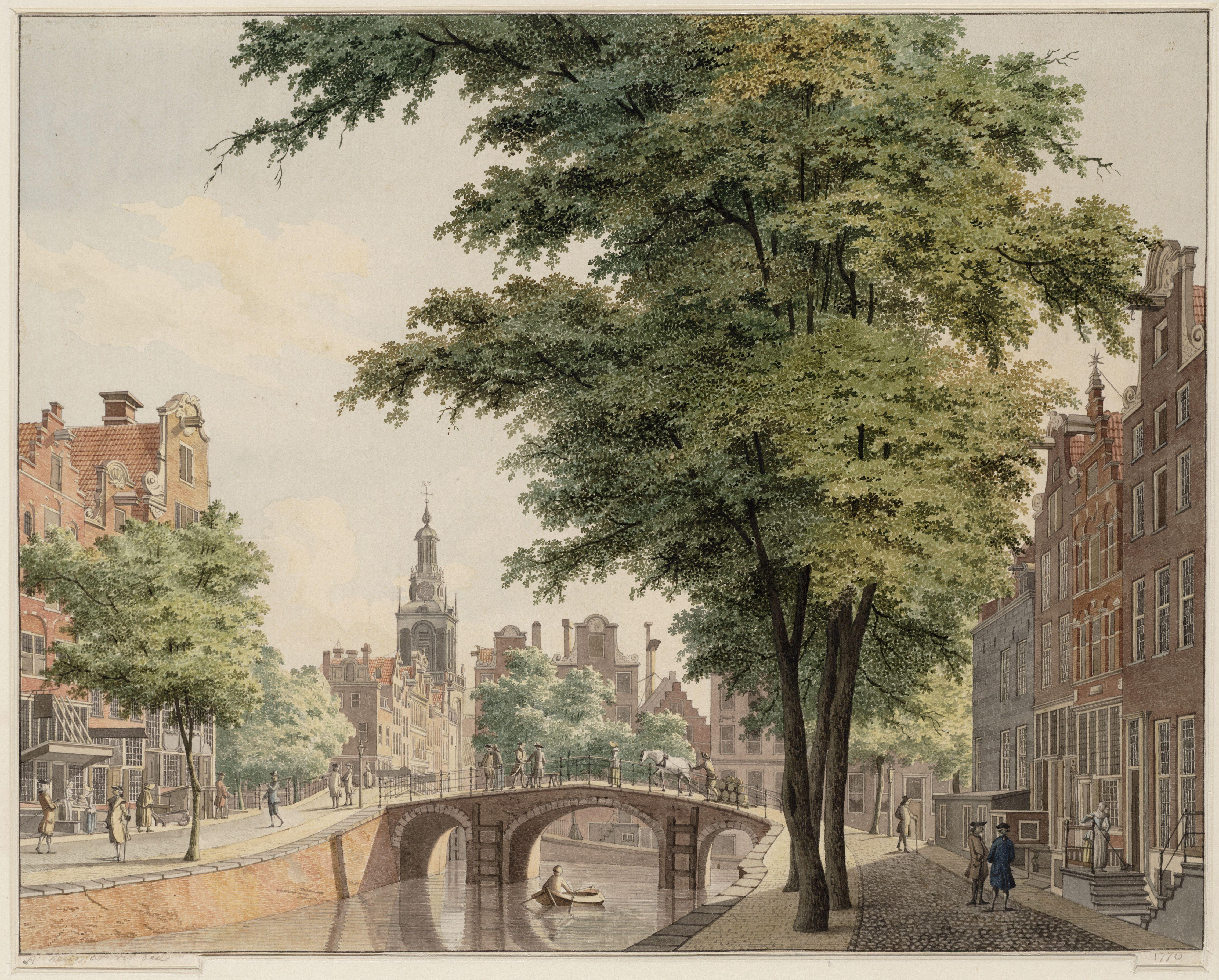 Leliegracht.